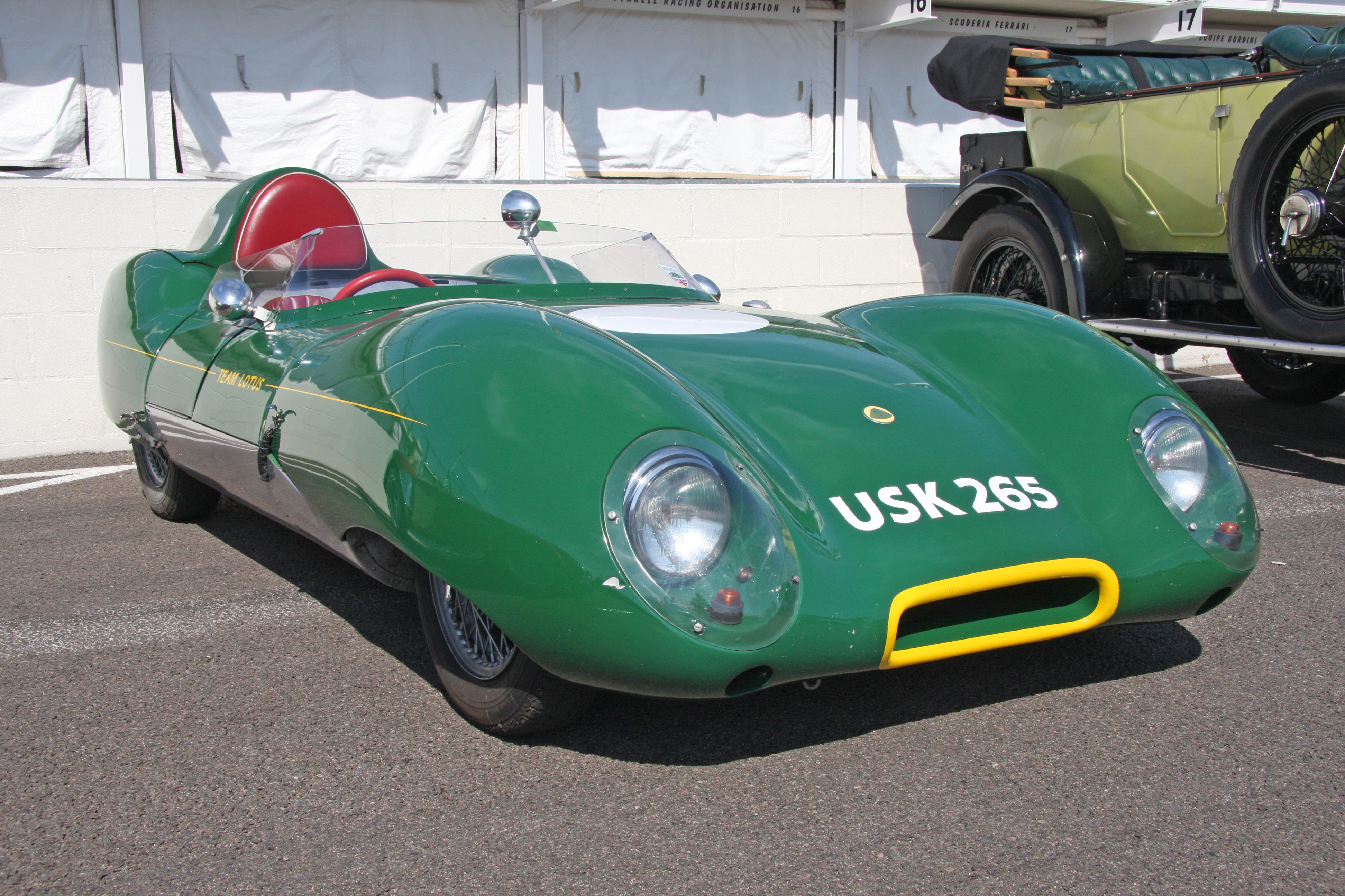 Lotus 11